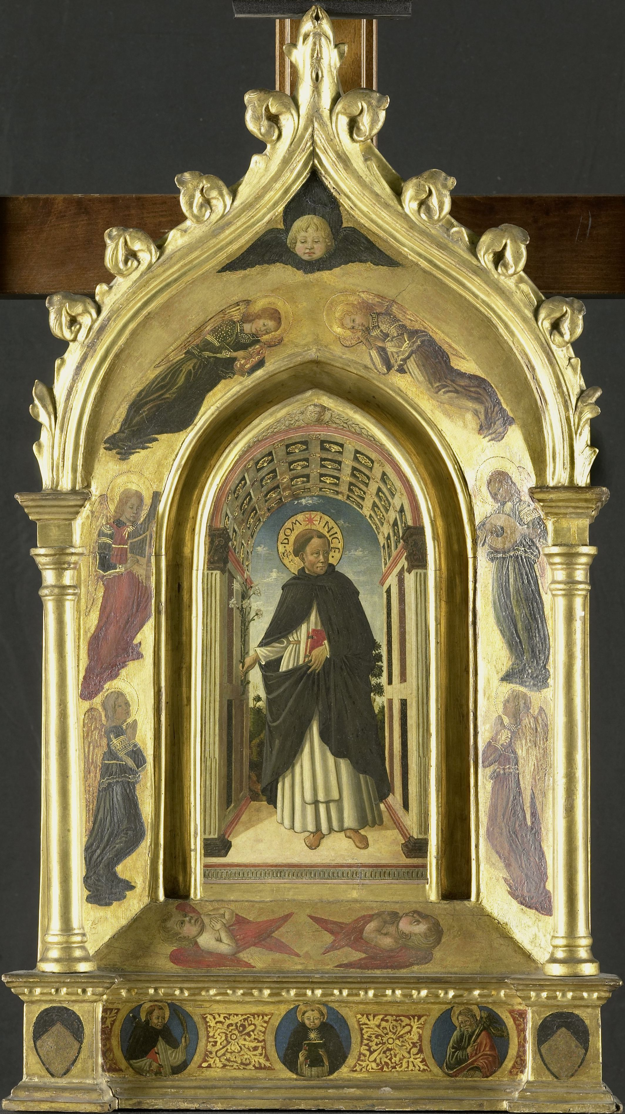 De heilige Dominicus, staande ten voeten uit in een poort met een lelietak in de rechterhand en een boek in de linkerhand. Op de omlijsting engelen en serafijnen, op de predella medaillons met de heiligen Petrus Martyr, Thomas en Mattheüs. Met geïntegreerde lijst.